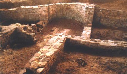 Detalle de los restos de la planta de la villae romana situada en el yacimiento arqueológico de «El Conventón» en la localidad de Rebolledo (Cantabria).